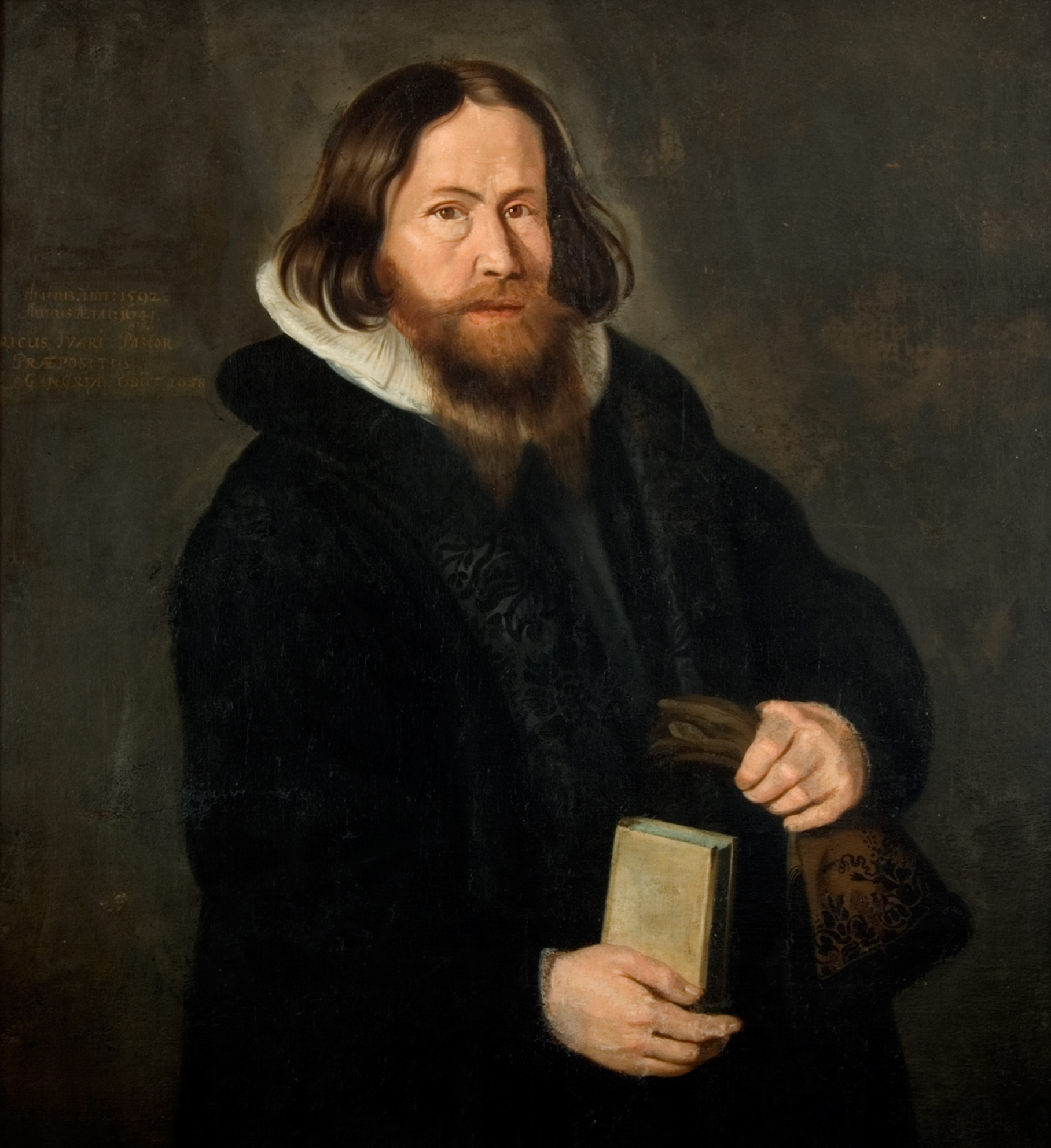 Erik Iversen Nordal måla av Elias Fiigenschoug.